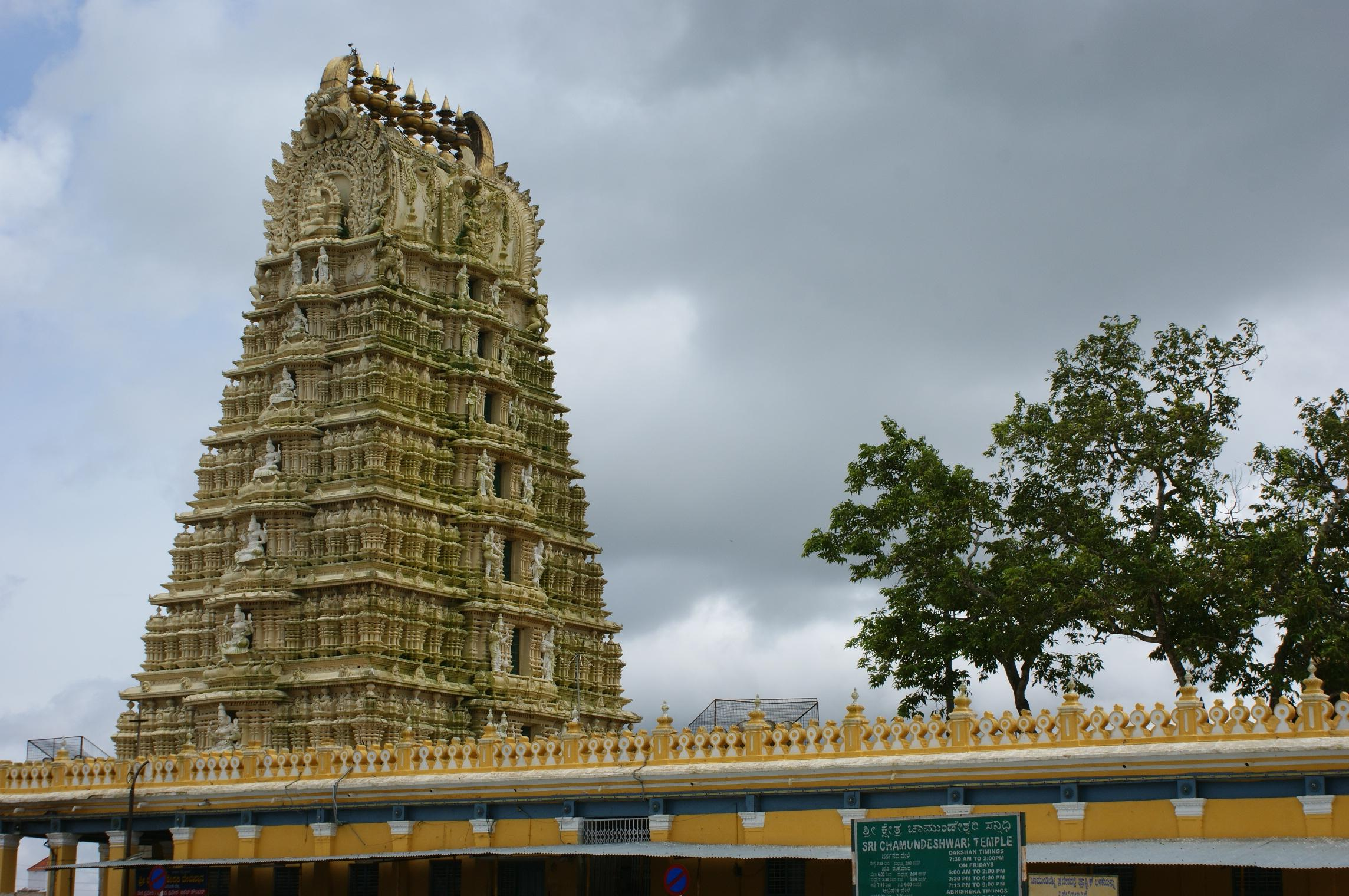 ശ്രീ ചാമുണ്ഡേശ്വരി ക്ഷേത്രം, മൈസൂർ